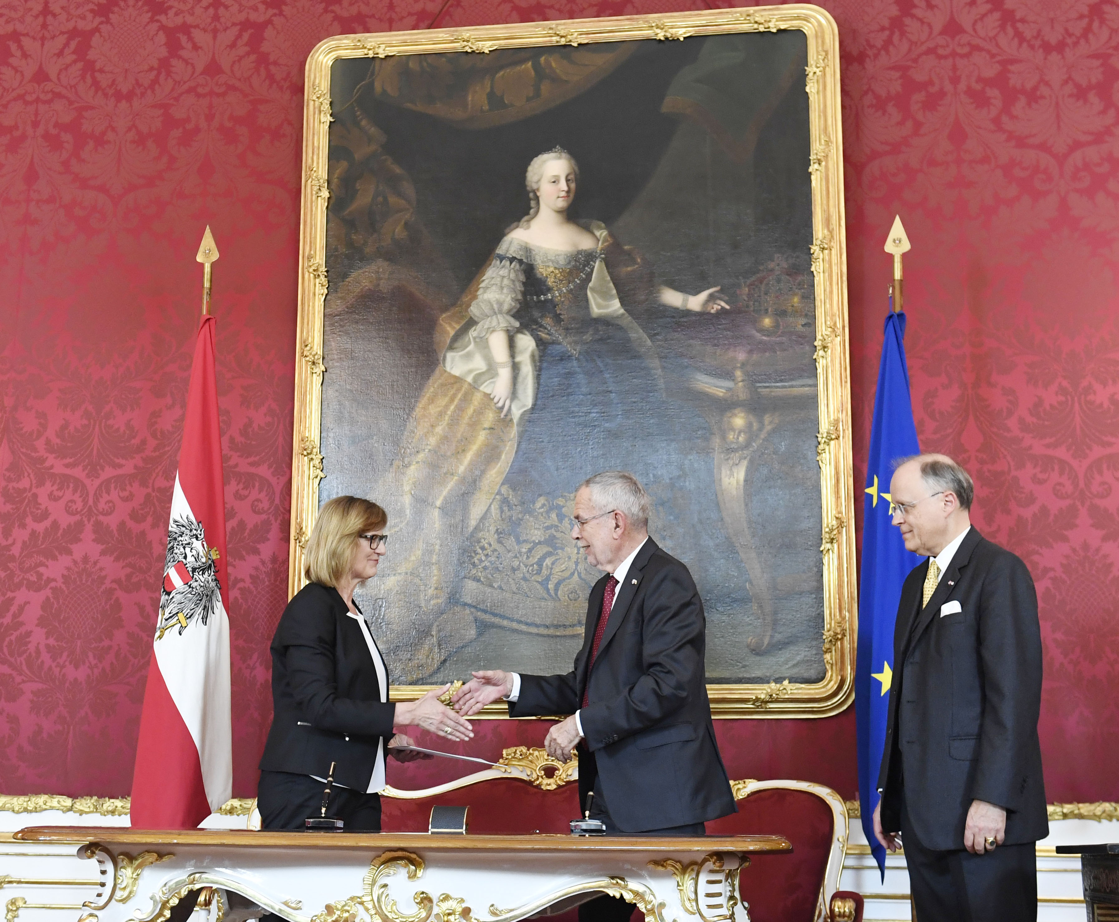 Am 3. Juni 2019 wurde Mag. Alexander Schallenberg als Bundesminister für Europa, Integration und Äußeres angelobt. Foto: Mahmoud